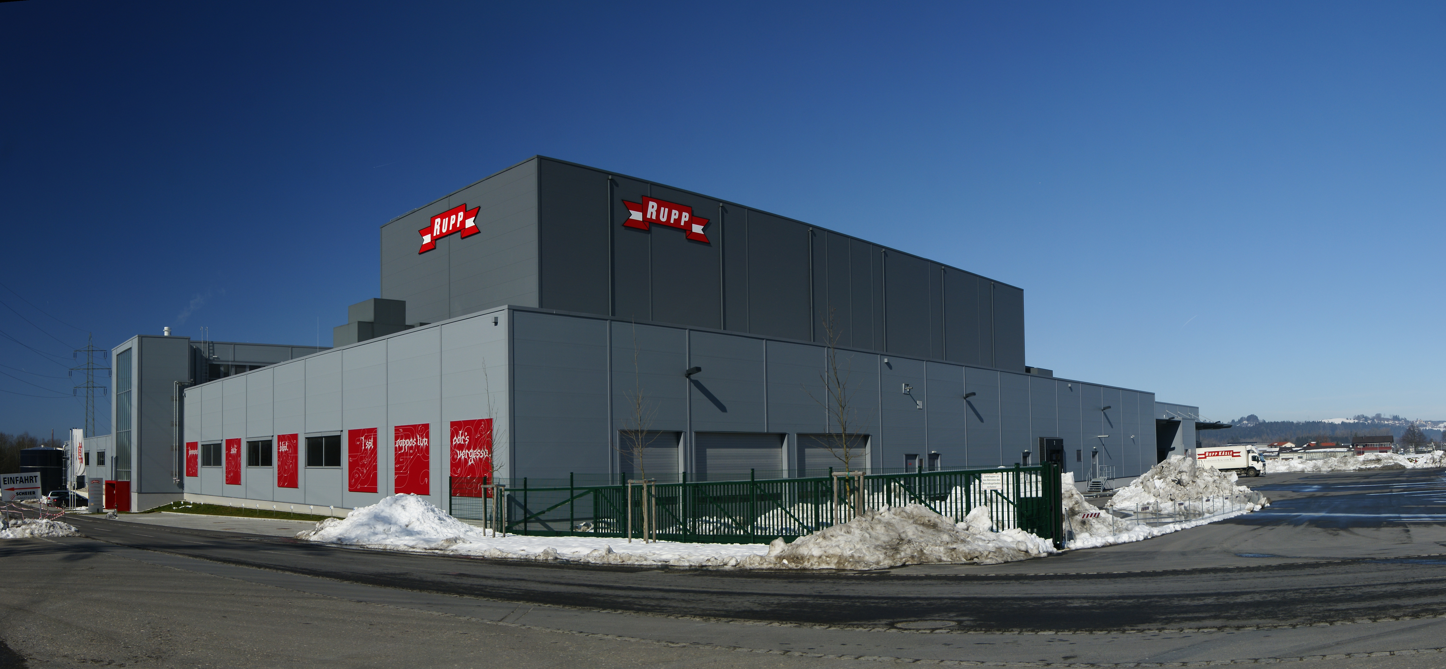 Panorama aus mehreren Bilder. Die Firma Rupp AG ist ein österreichisches Unternehmen im Bereich der Käseproduktion. 2006 erzielte das Unternehmen mit insgesamt 280 Mitarbeitern einen Umsatz von 80 Mio. Euro. Das Unternehmen ist der größte Käseproduzent in Vorarlberg und zum größten Teil in Familienbesitz. Der Firmensitz liegt in Hörbranz in Vorarlberg.